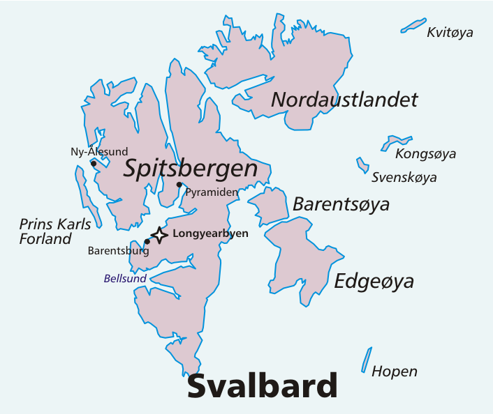 Map of Svalbard, showing Svenskøya.